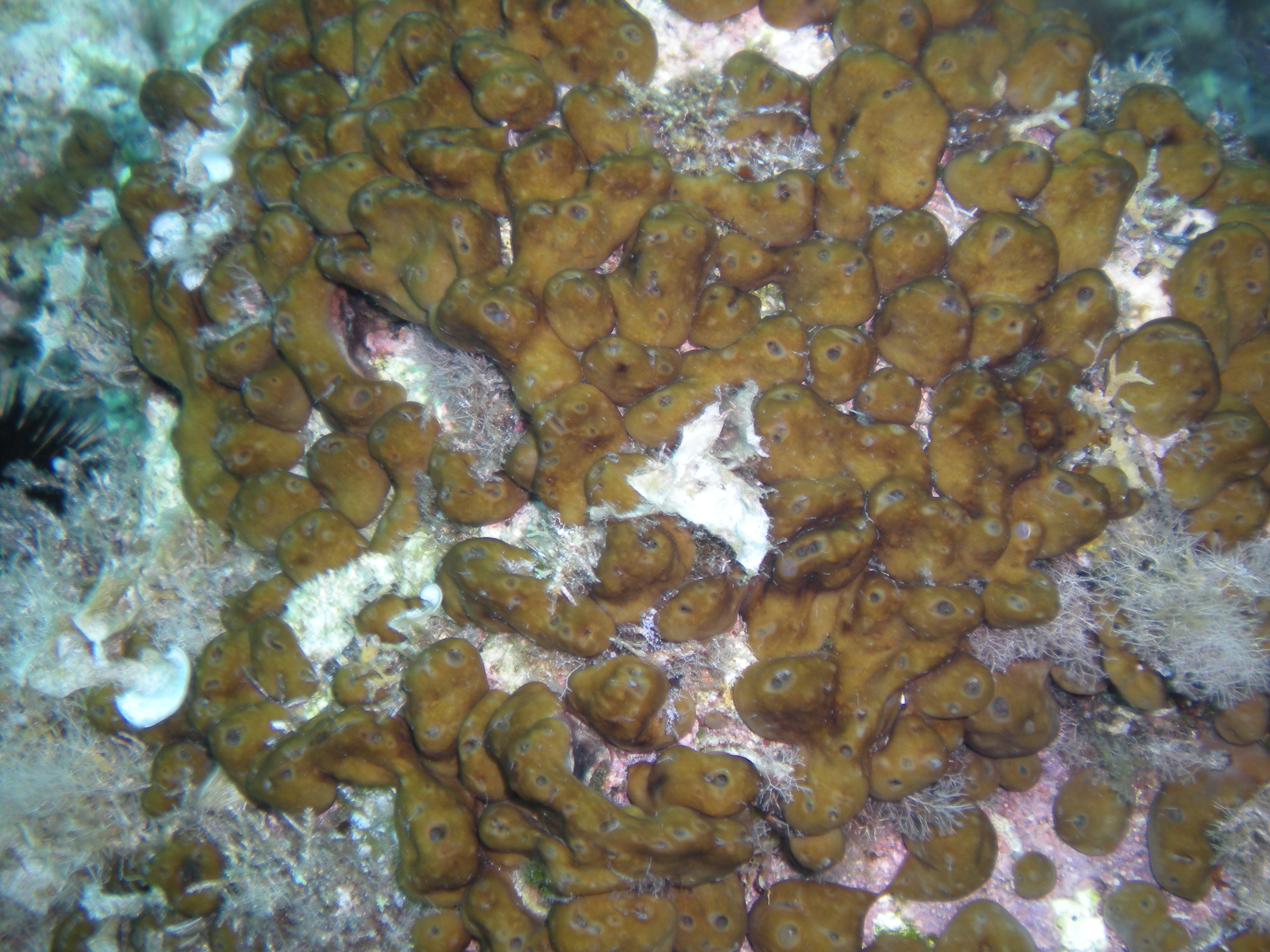 Chondrilla nucula (Demospongiae) AMP Capo Gallo, Sicily